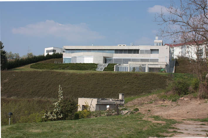 Vila Kociánka, ukázka nejmodernější architektury v Brně